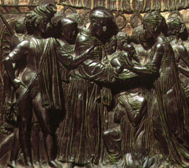 Donatello, miracolo del neonato che parla, dettaglio 01